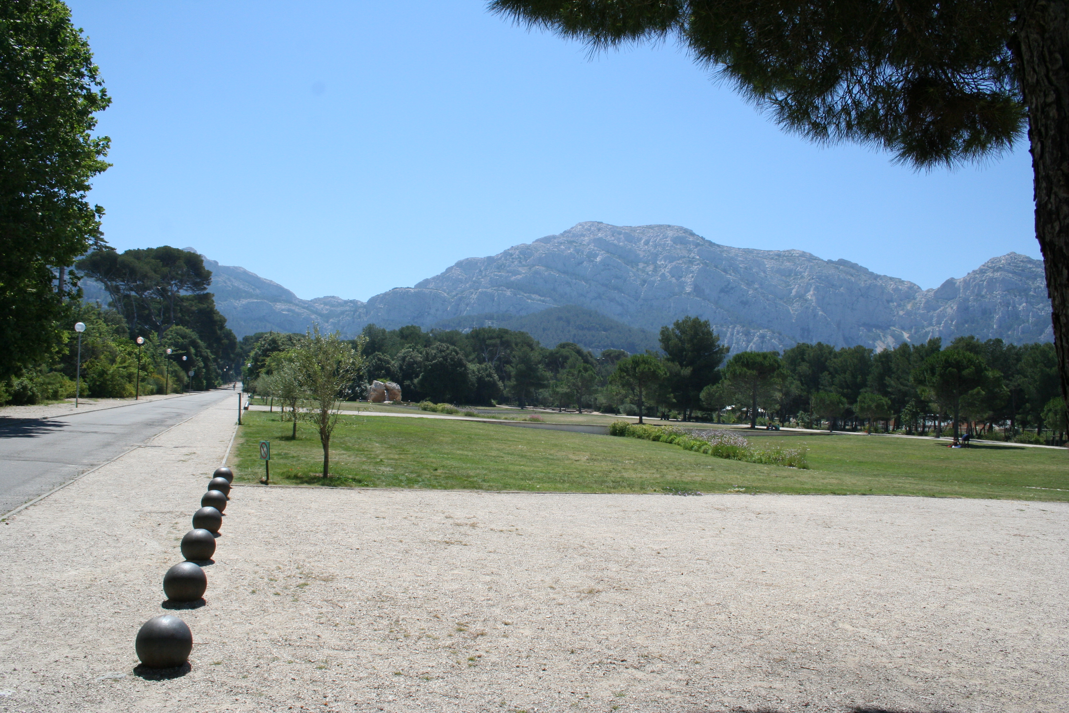 Campagne Pastré où se trouve le Châreau Pastré avec le musée de la faïence . Cette propriété a été achetée par la ville de Marseille.